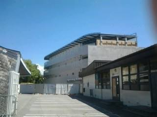 photo du collège lycée juvénat vue de l'interieur